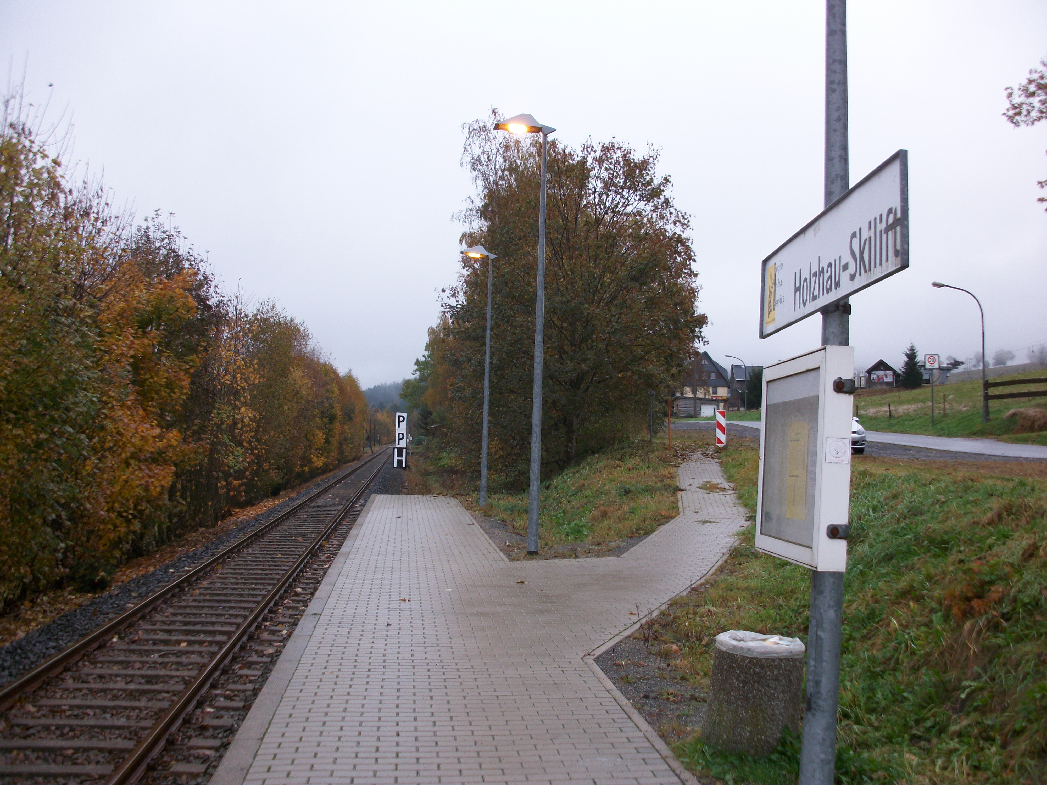 Haltepunkt Holzhau Skilift (2016)